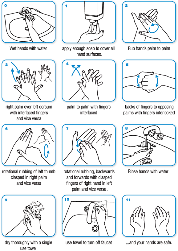 Immagine pubblicata sul sito ufficiale dell'organizzazione mondiale della sanità, illustra come lavarsi le mani per prevenire il contagio.